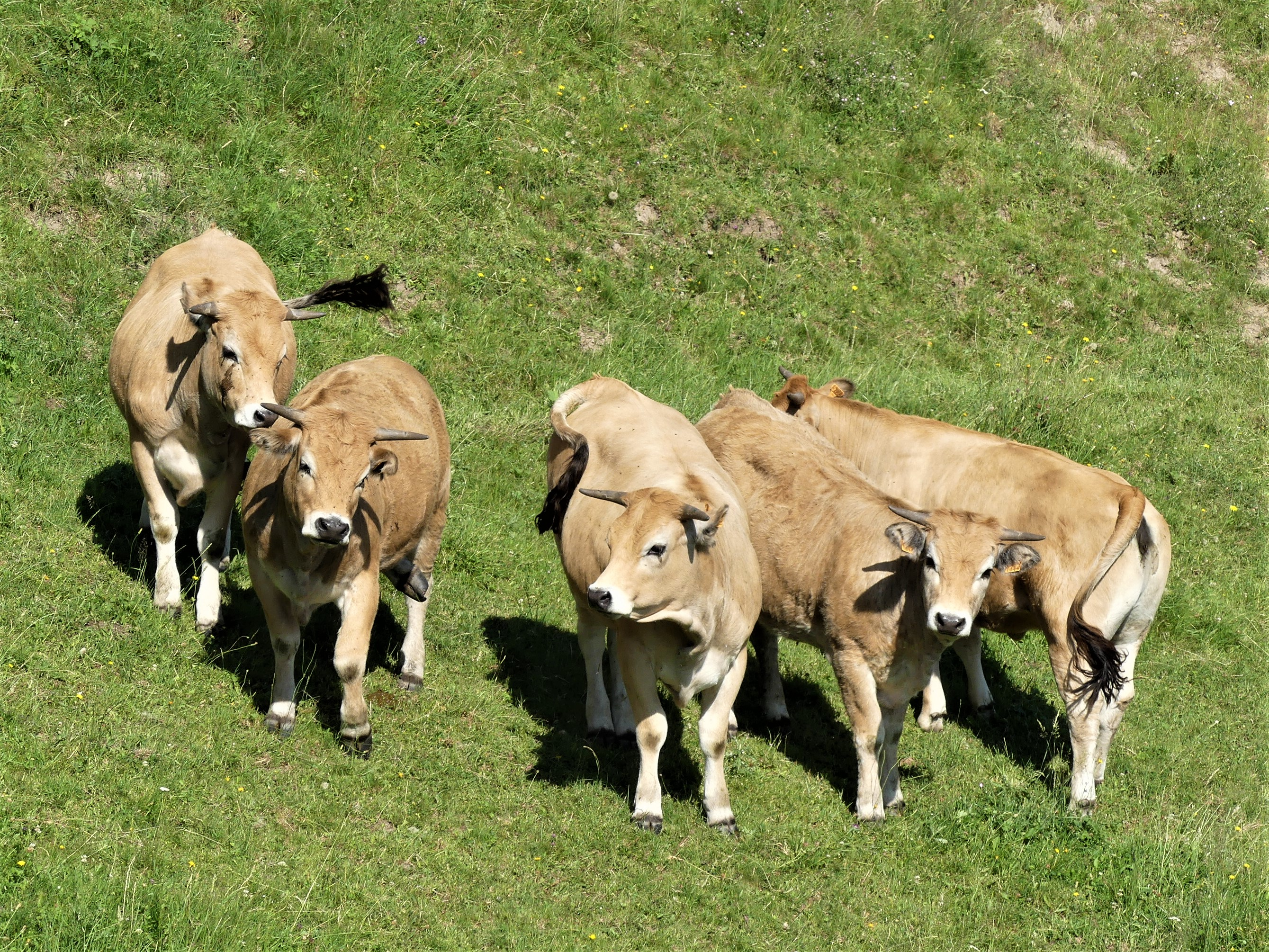 Bovins à Golinhac, Aveyron, France.